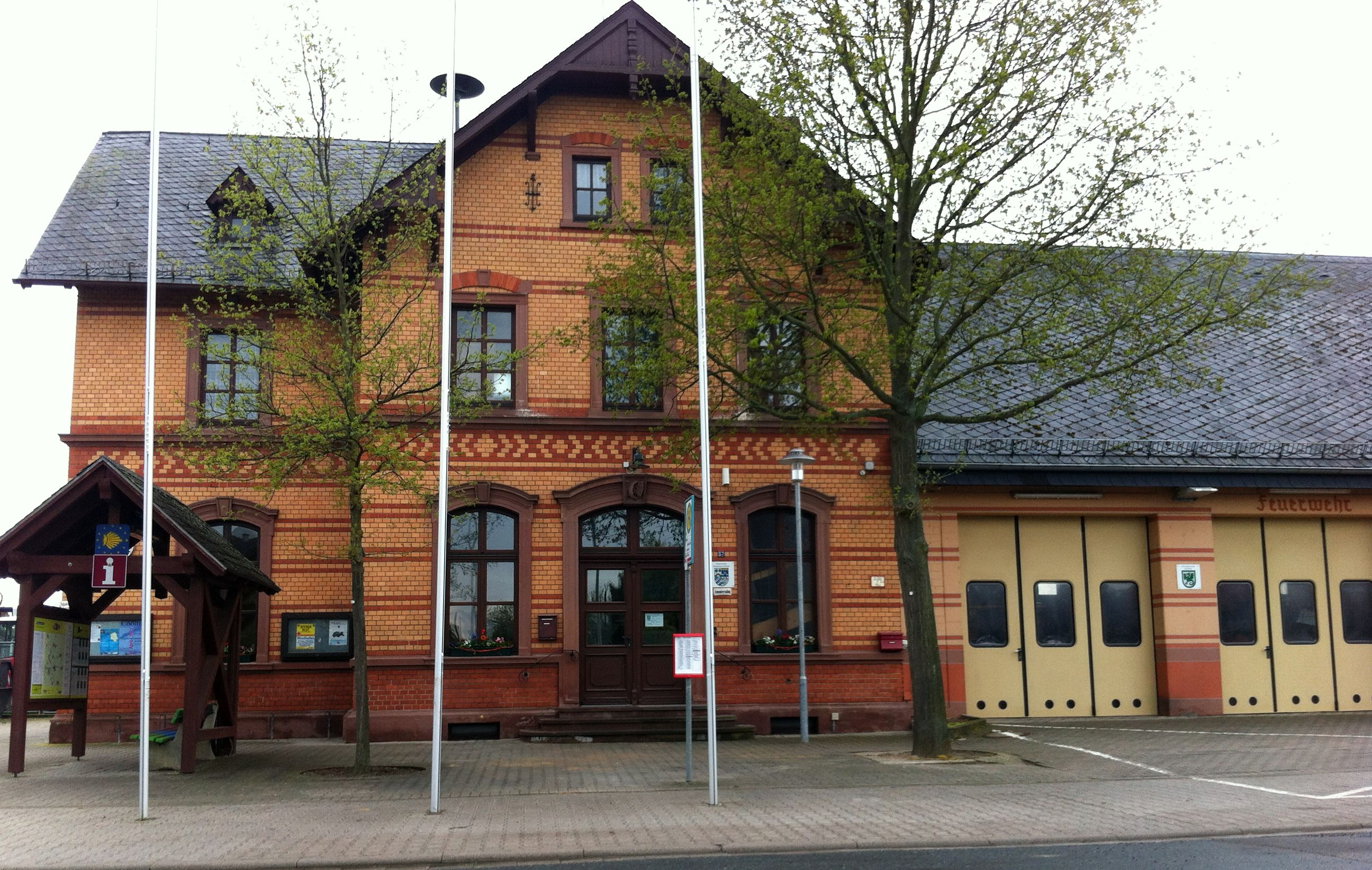 ehemaliges Bahnhofsgebäude Dittelsheim-Heßloch DB-Strecke 3564, aktuelle Nutzung als Bürgerhaus mit Unterkunft der FFW im Anbau.